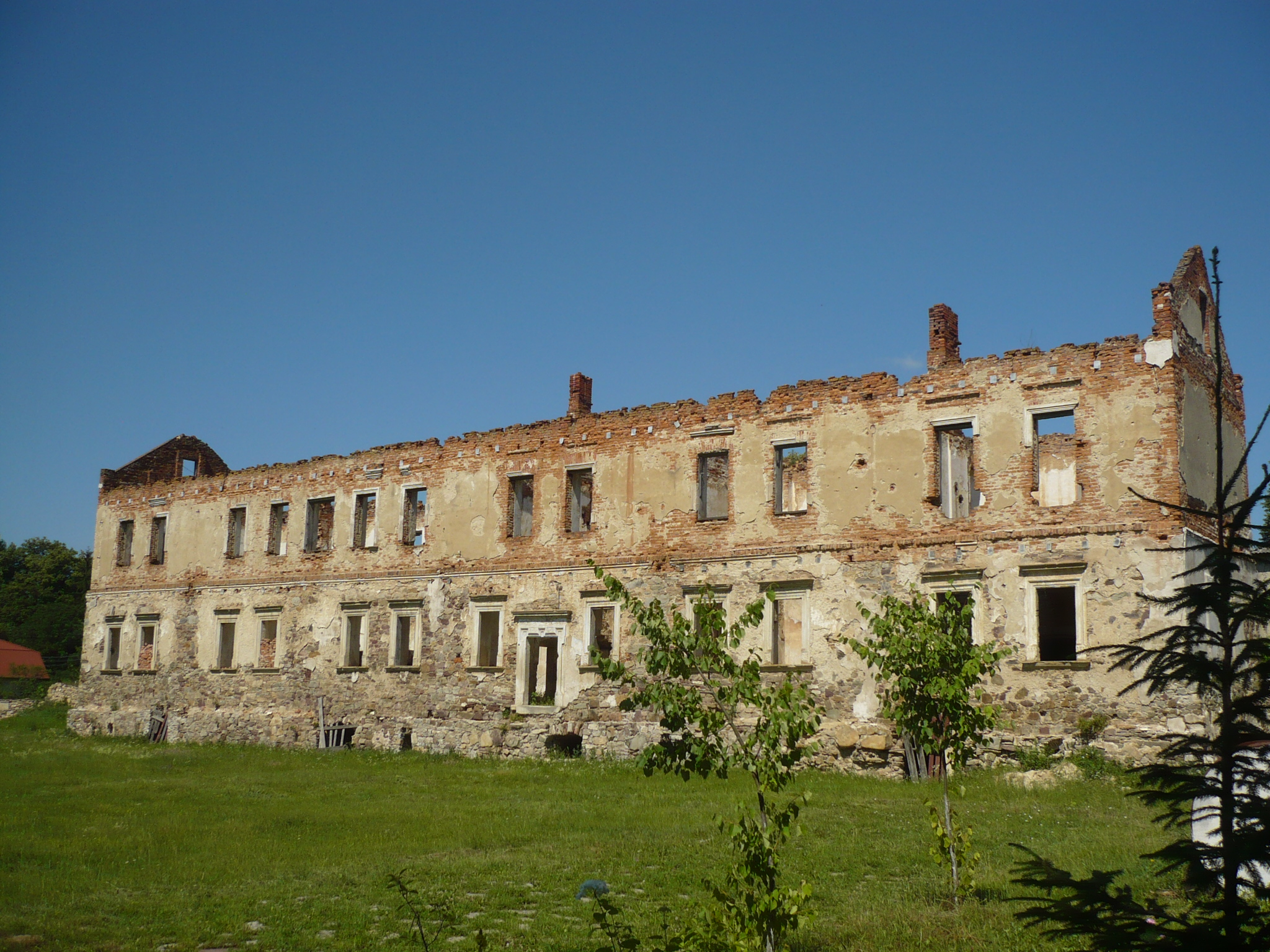 Potok Złoty. Zamek